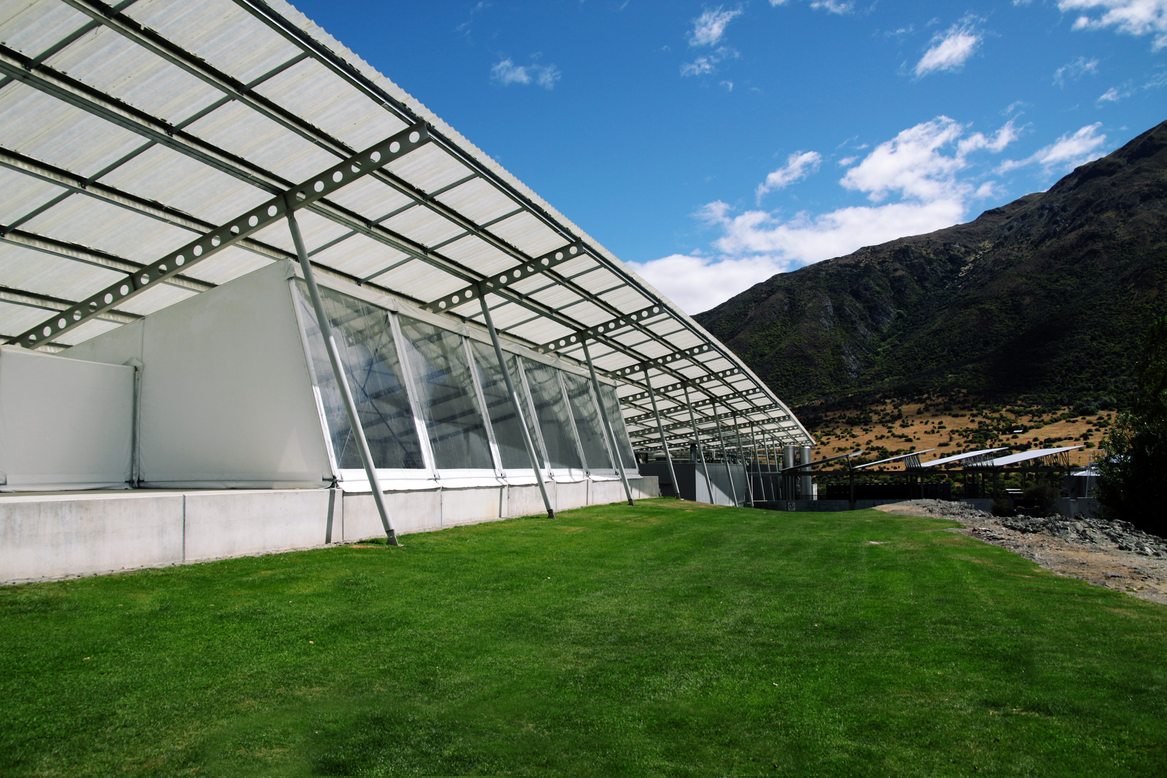 Cuverie et Cellar Door Peregrine, Central Otago